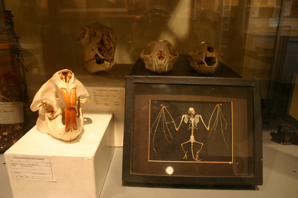 Plusieurs crânes d'animaux exposés dans un muséum